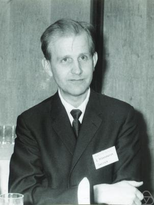 Lars Hörmander in Tokyo